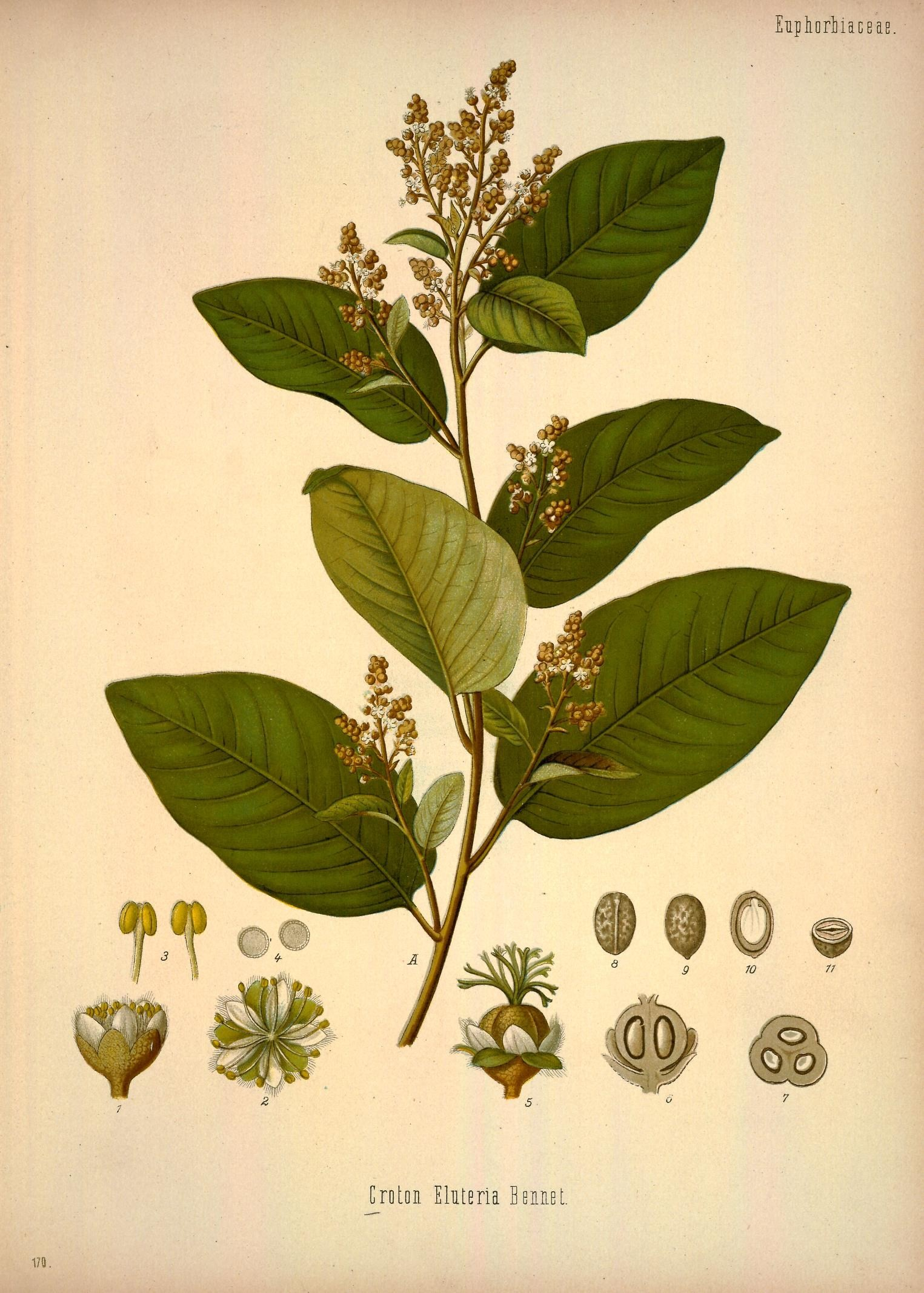 Kaskarillabaum. Croton Sloanei Benn. A blühender Zweig in natürlicher Grösse. 1 männliche Blüthe, vergrössert; 2 dieselbe von oben gesehen, desgl.; 3 Staubgefässe, desgl.; 4 Pollen, desgl.; 5 weibliche Blüthe, desgl.; 6 Fruchtknoten im Längsschnitt, desgl.; 7 derselbe im Querschnitt, desgl.; 8 und 9 Same von der Bauch- und Rückenseite, desgl.; 10 und 11 derselbe im Längs- und Querschnitt, desgl.